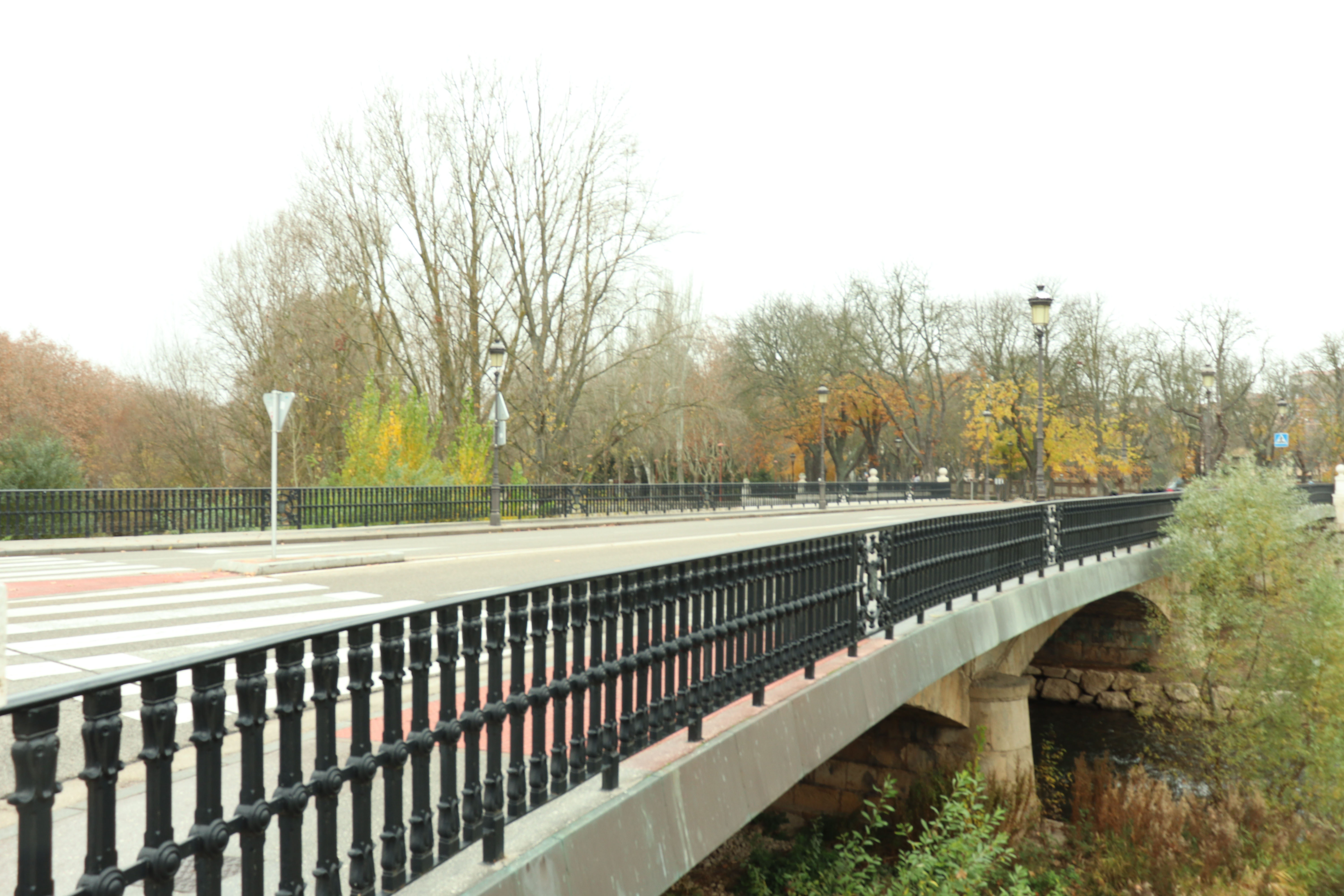 Puente situado en Burgos a la entrada del Paseo de la Isla